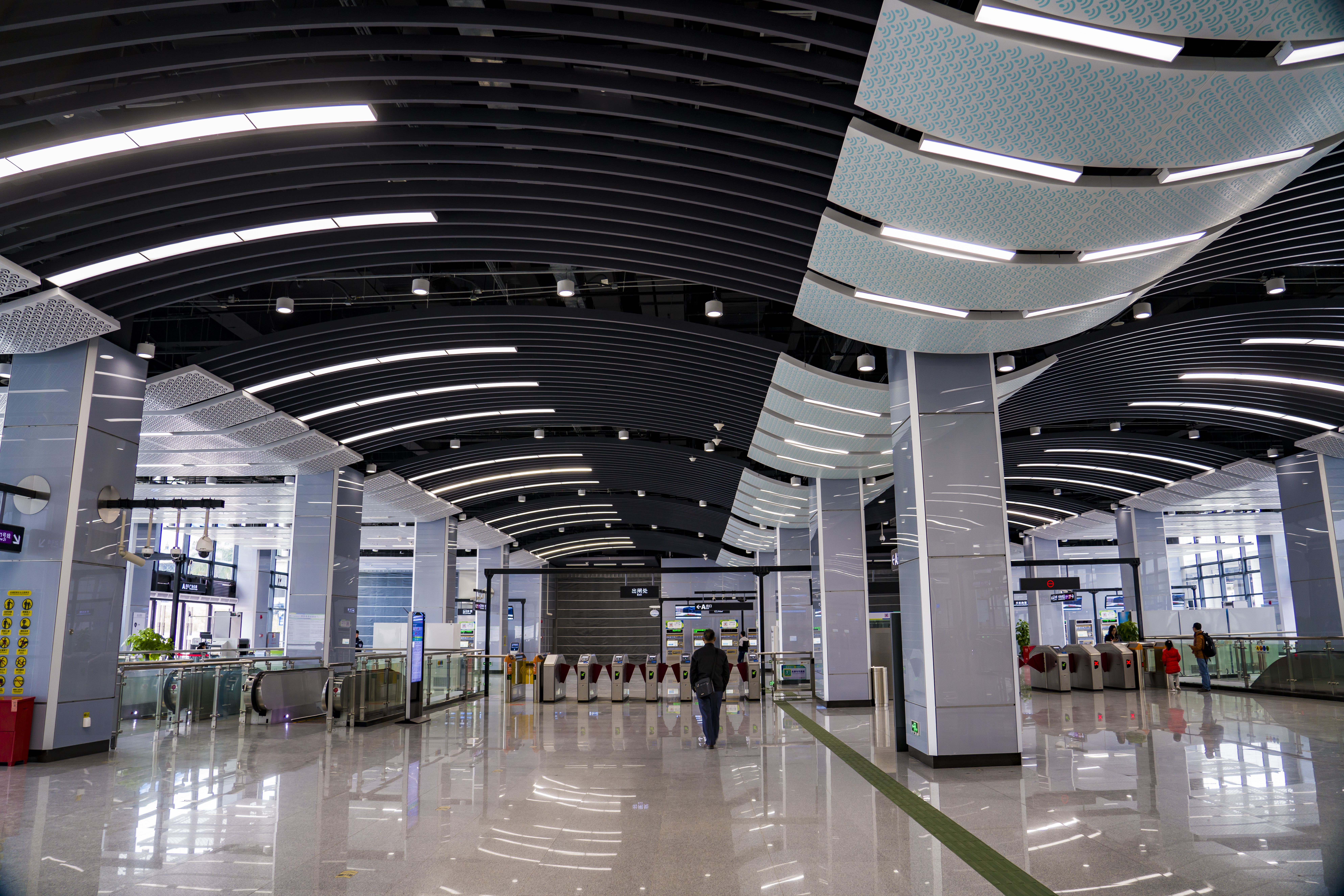 镇龙站站厅